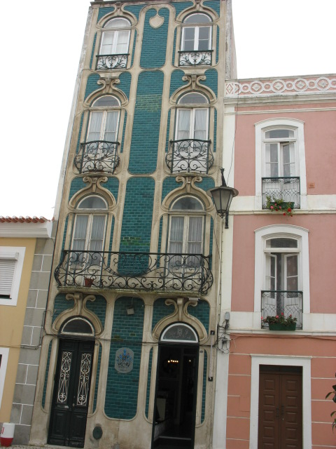 Caldas da Rainha (Portugal) - Prédio estilo Arte Nova/Art Noveau style building